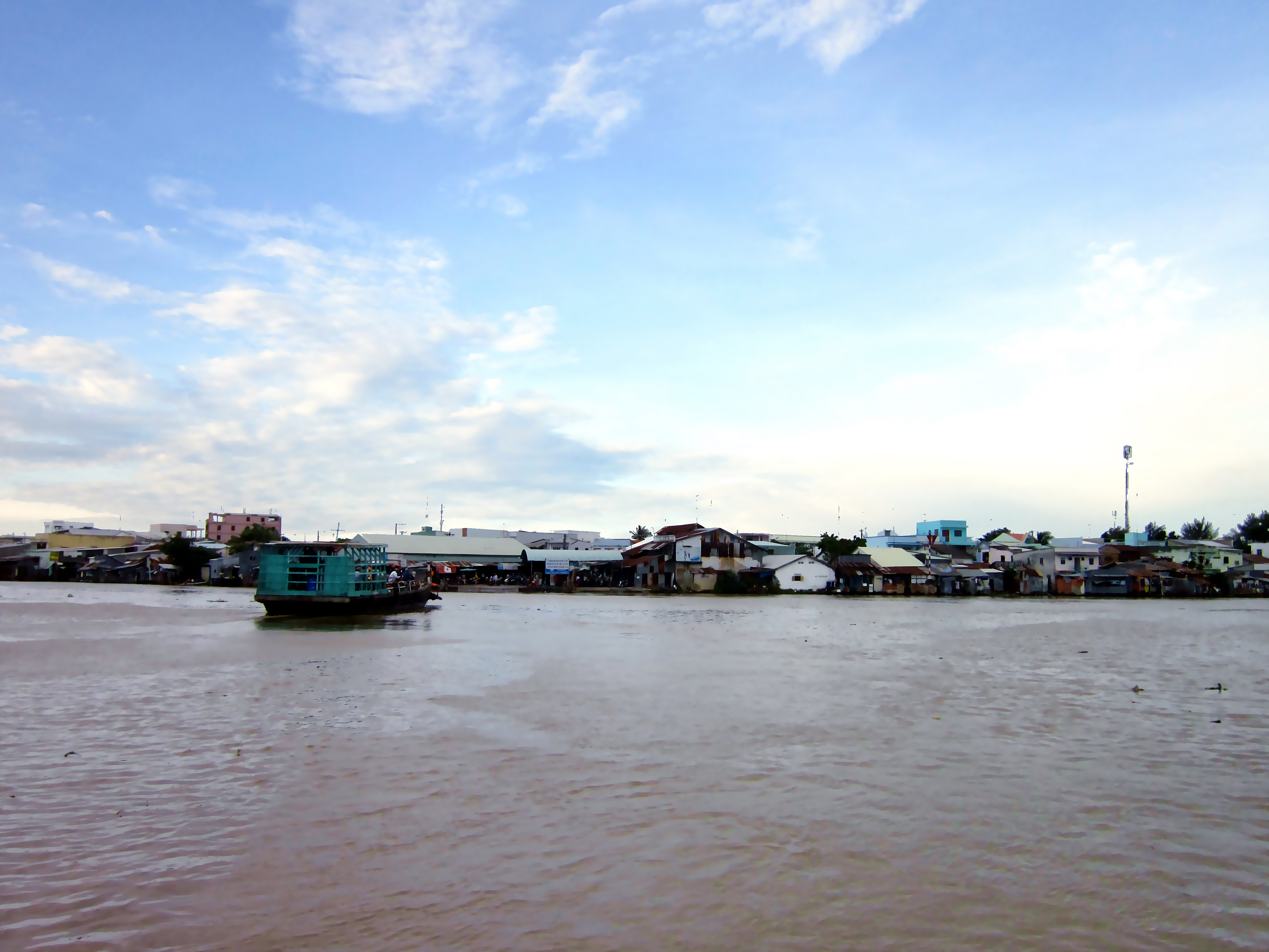 Bến phà nhỏ ở phường Vĩnh Thanh, thuộc thành phố Rạch Giá, tỉnh Kiên Giang, Việt Nam.